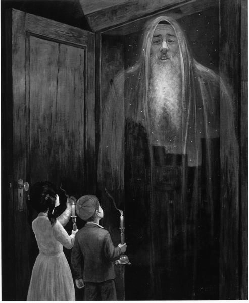 אליהו הנביא בסדר ליל פסח